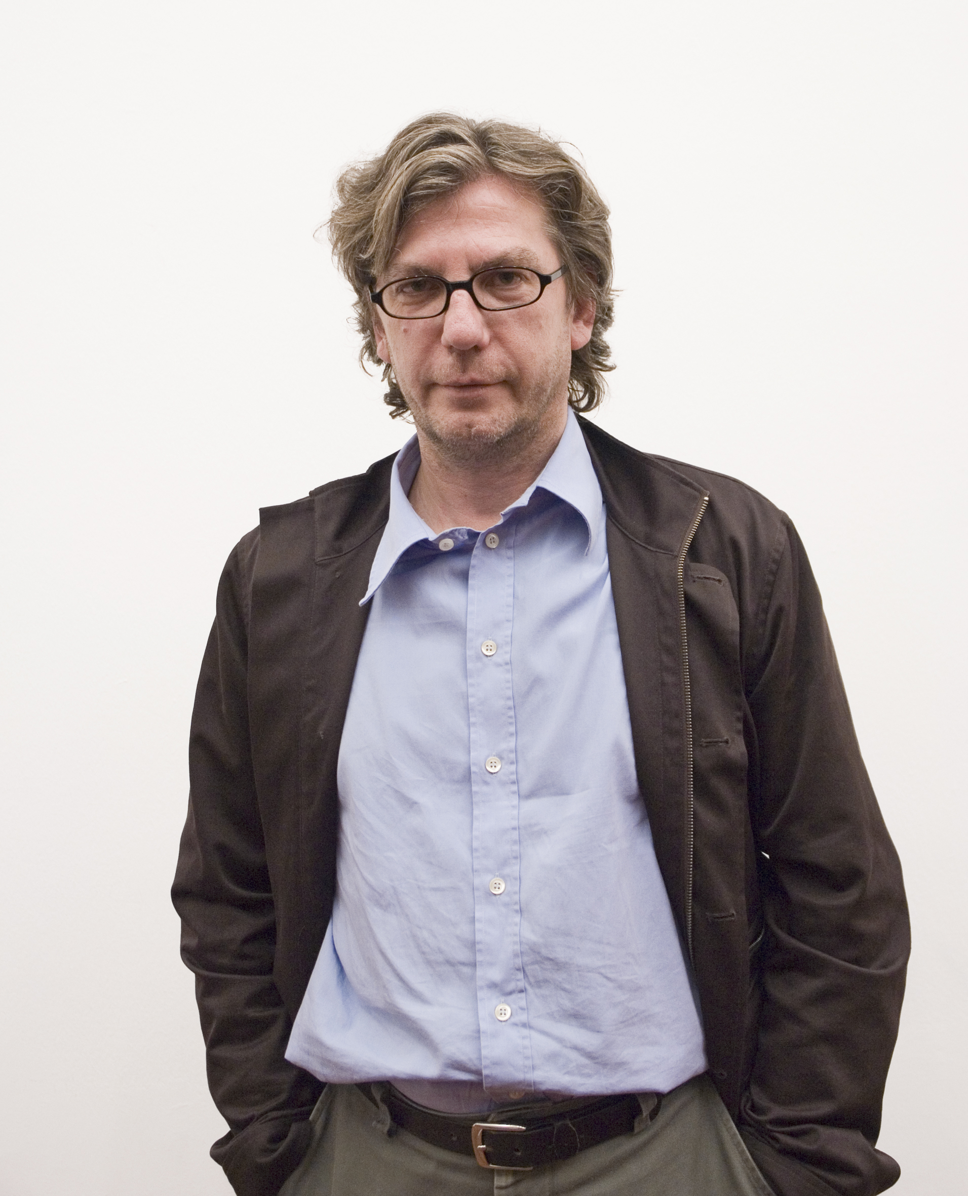 Thomas Ruff, Deutscher Fotograf (Photographer, German)